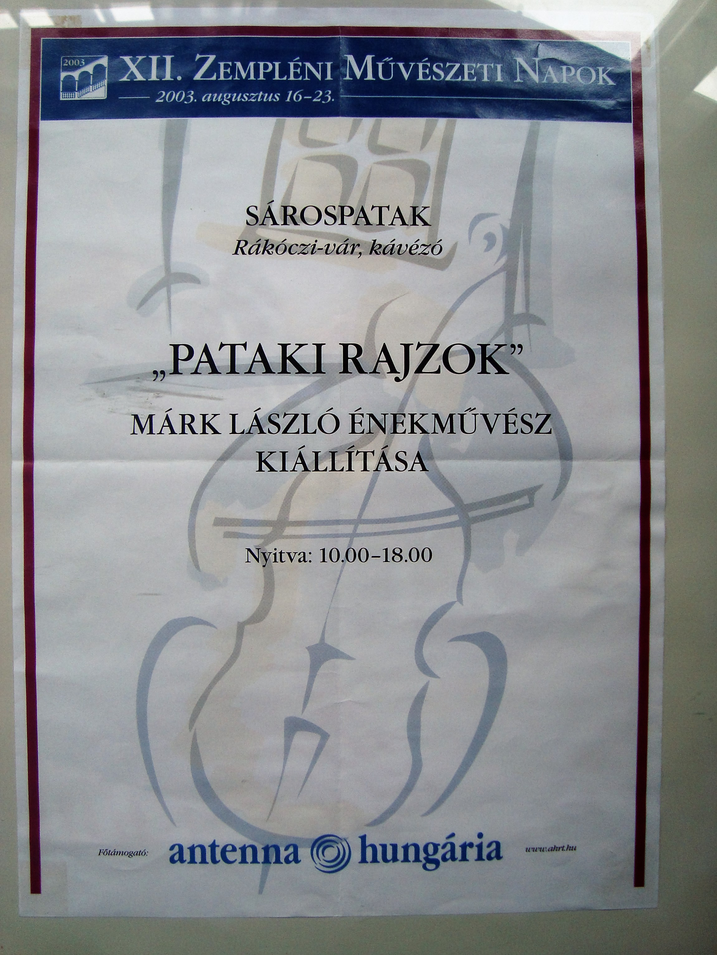 Márk László operaénekes grafikái